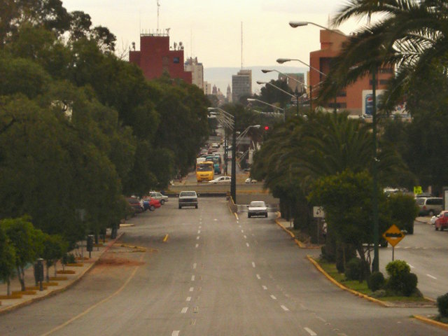 San Luis P.